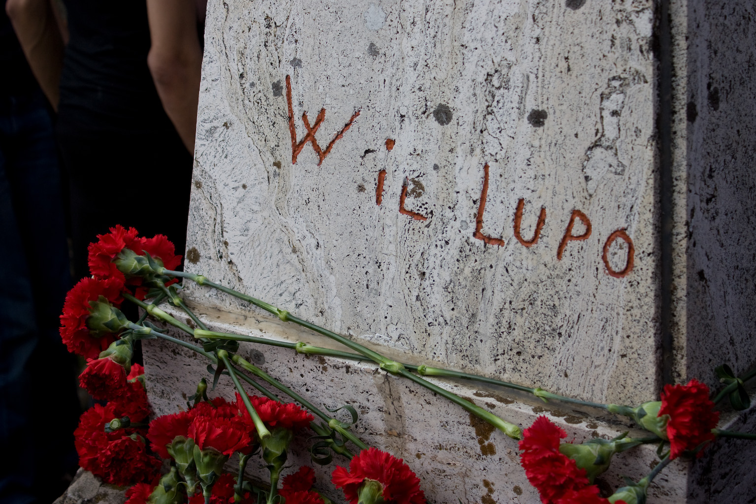 Mario Musolesi (Vado di Monzuno, 1 agosto 1914 – zona di Marzabotto, 29 settembre 1944) è stato un partigiano italiano. Mario Musolesi, partigiano apartitico e credente, fa parte di quella particolare schiera di antifascisti dell'Emilia-Romagna privi di un partito politico di riferimento che, durante la Resistenza, seppur non di rado in contrasto con i comandi partigiani, furono combattenti irriducibili del nazifascismo, costituendo delle vere e proprie spine nel fianco per le forze occupanti tedesche e per i collaborazionisti repubblichini, sia per la loro capacità militare che per la loro personalità carismatica[...]